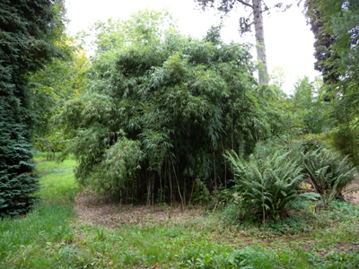 Batsuford Bamboo